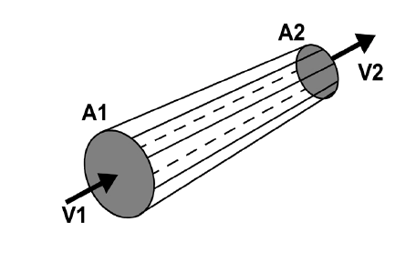 Illustratie ter verduidelijking van de continuiteitswet.